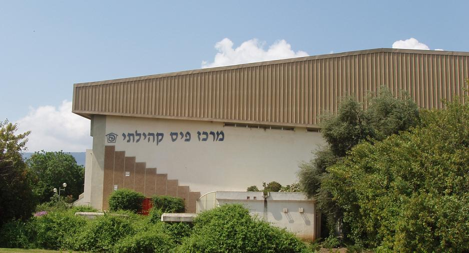 אולם ספורט בכפר בלום, שהוקם בסיוע מפעל הפיס. צילם דוד שי.